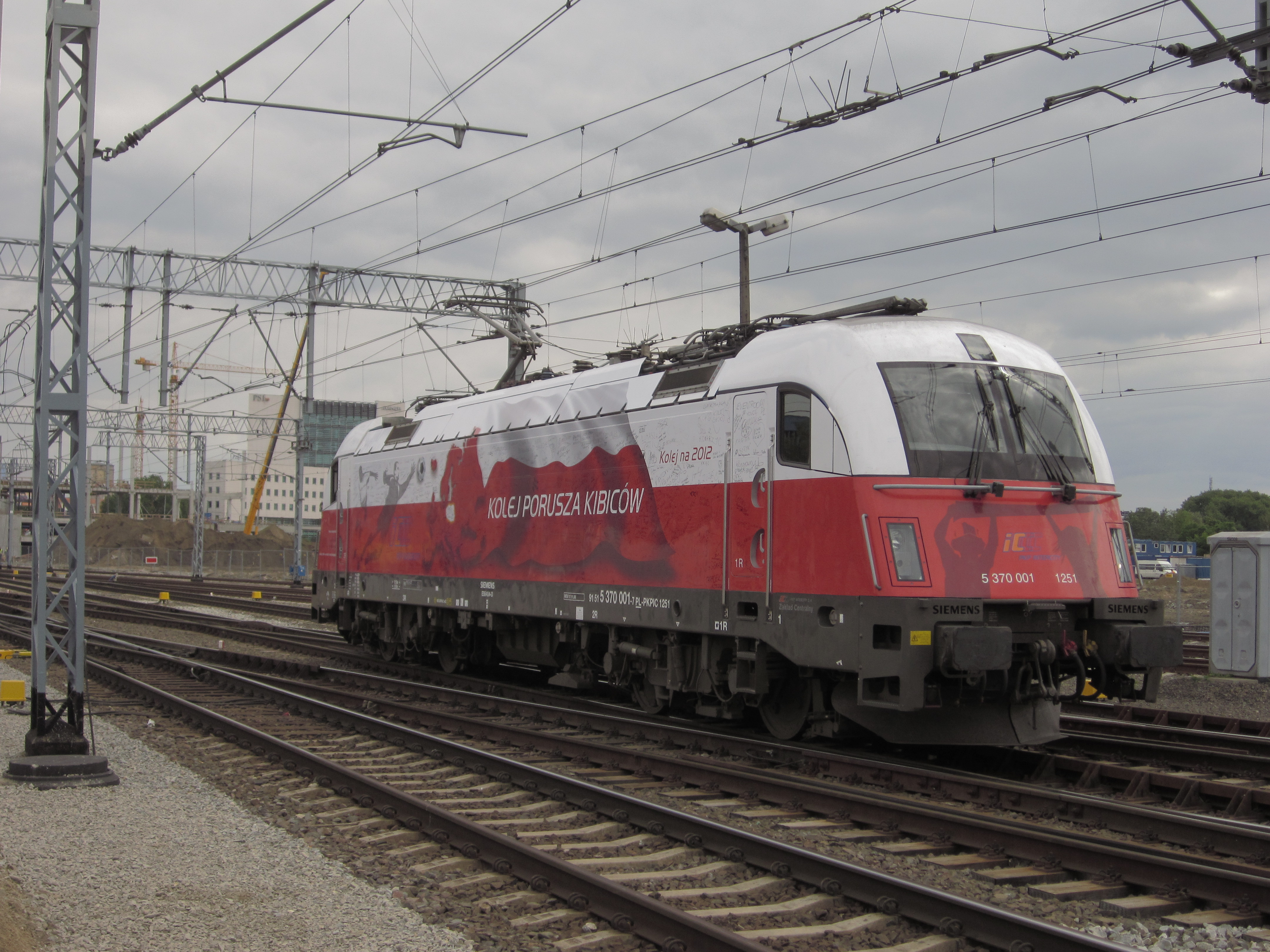 EU44-001 "Husarz" w barwach Polski oklejony z okazji EURO 2012.